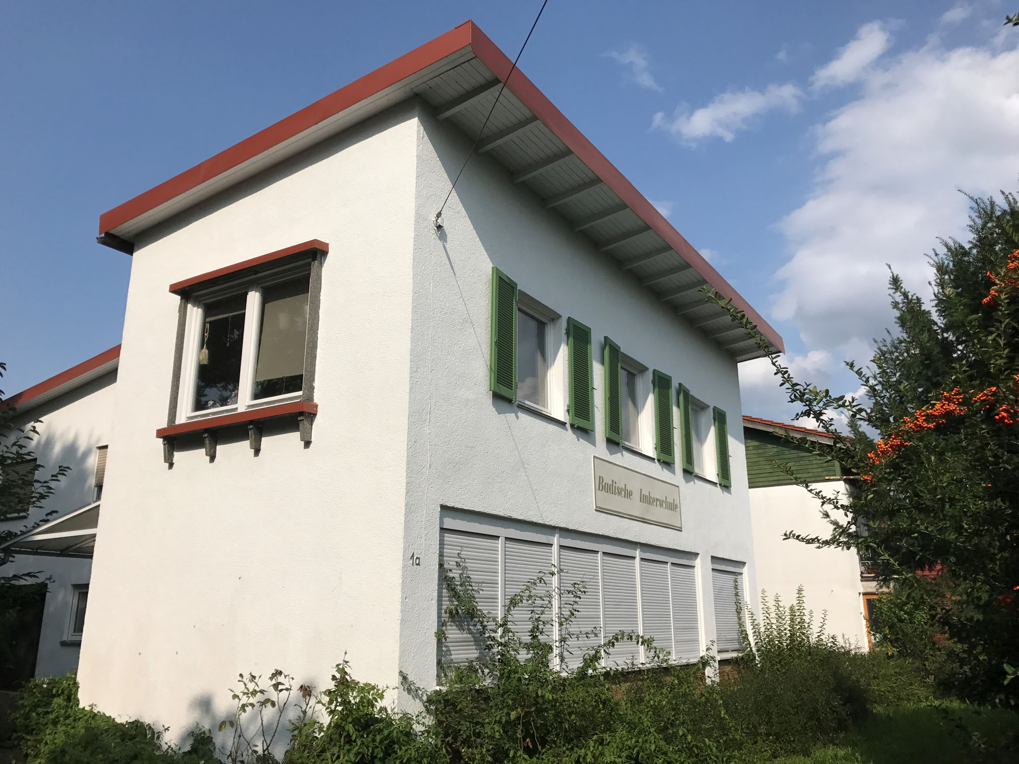 Badische Imkerschule in Heidelberg, Deutschland